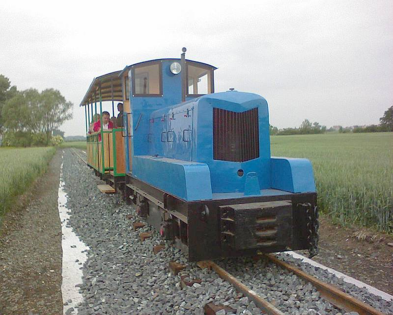 Kolínská řepařská drážka, zvláštní vlak se členy kolaudační komise